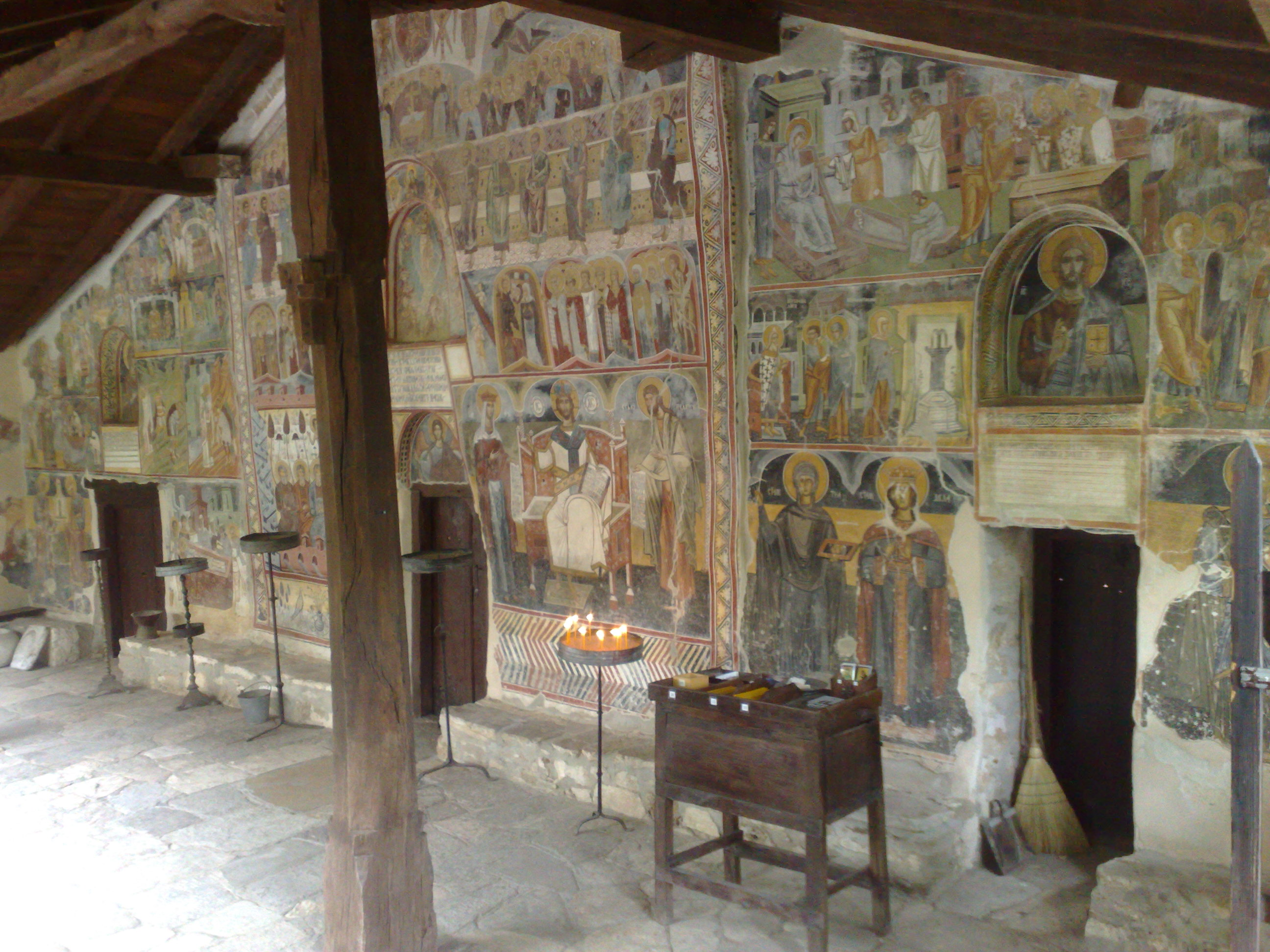 Иконостасот во манастирот. Манастирот Свето Преображение - Зрзе се наоѓа на 34 километри северозападно од Прилеп, на 1000 метри надморска височина во подножјето на планинскиот масив Даутица.